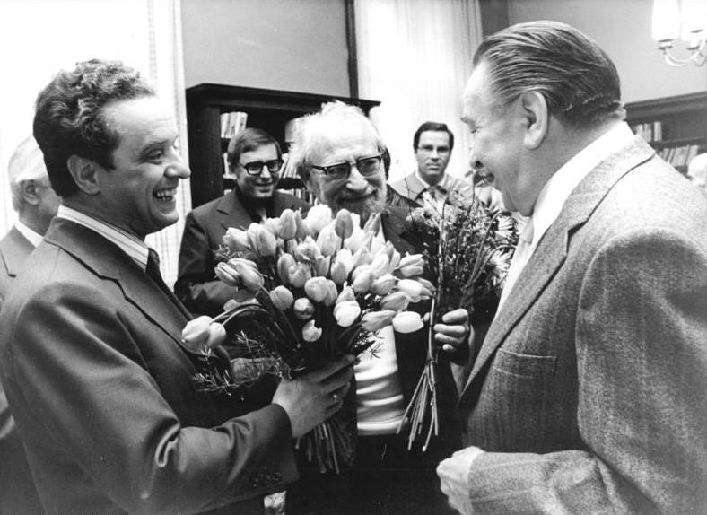 ADN-ZB Katschorowski 12.5.75 Berlin - Karl v. Appen 75 Jahre Seinen 75. Geburtstag feierte am 12.5.75 der langjährige Chefbühnenbildner des Berliner Ensembles, Karl von Appen (r.). Aus diesem Anlaß fand in der Akademie der Künste der DDR am Robert-Koch-Platz für das Ordentliche Mitglied der Akademie eine Gratulationscour statt. Mit herzlichen Worten gratulierten der Präsident des Verbandes der Theaterschaffenden der DDR, Prof. Wolfgang Heinz (Mitte) und der Vizepräsident Hans Dieter Mäde (l.) dem Jubilar.